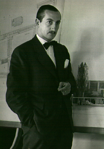 Mario Paysse Reyes